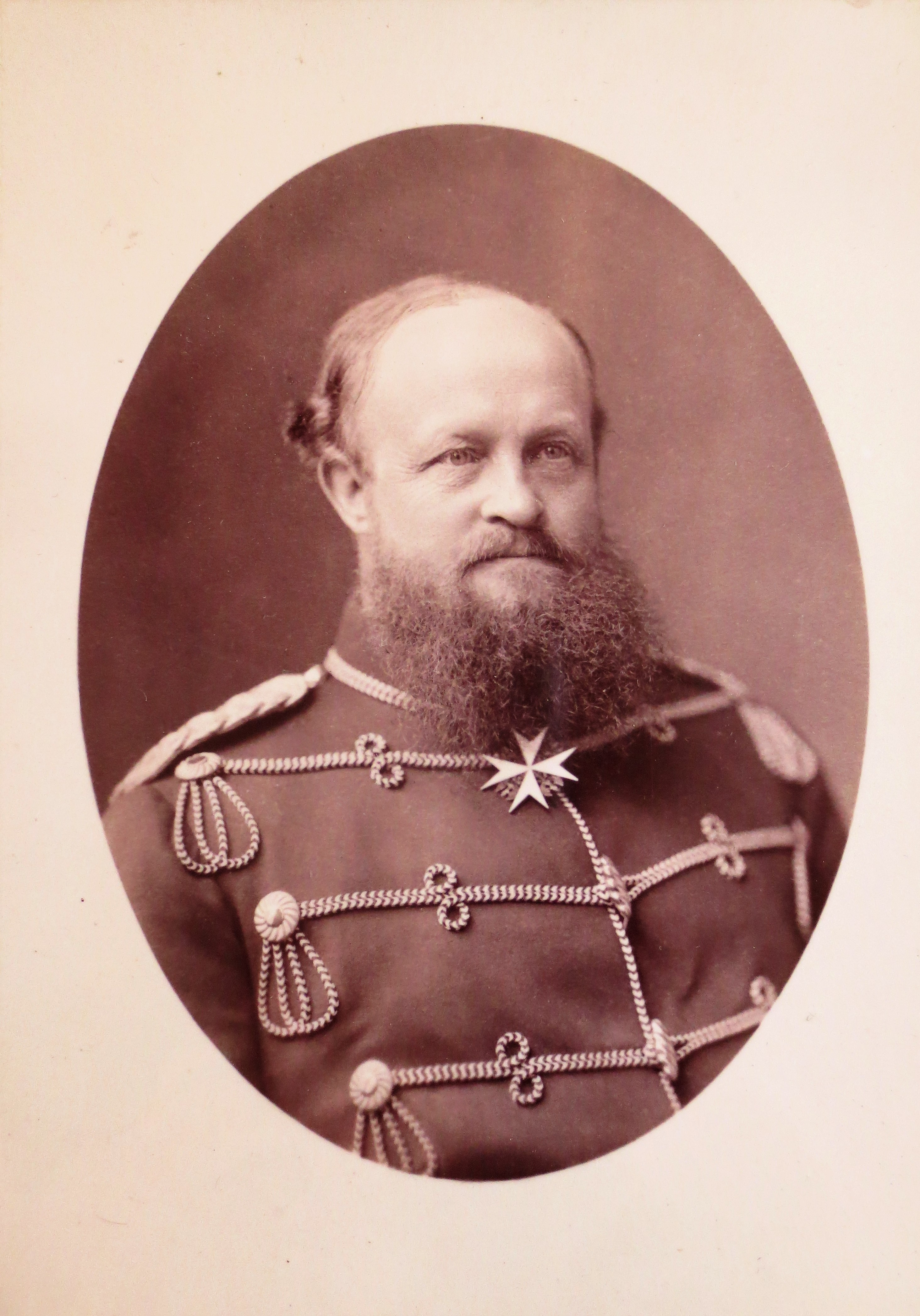 Portraitaufnahme des Fürsten Ludwig zu Sayn-Wittgenstein-Hohenstein, ca. 1880. Eigene Aufnahme in der Rentkammer Wittgenstein am 10. April 2018